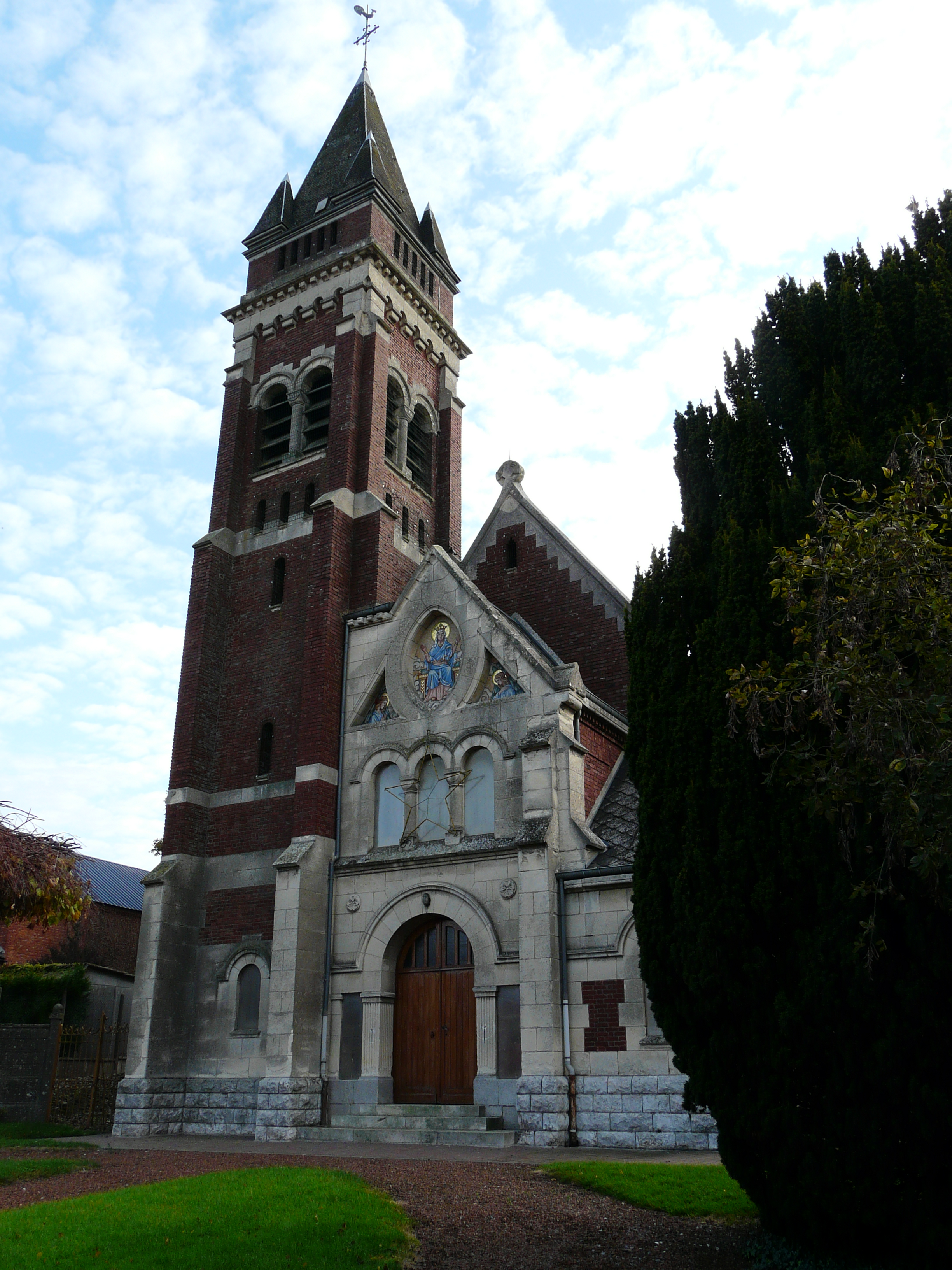 L'église de Bantouzelle (Nord, France)